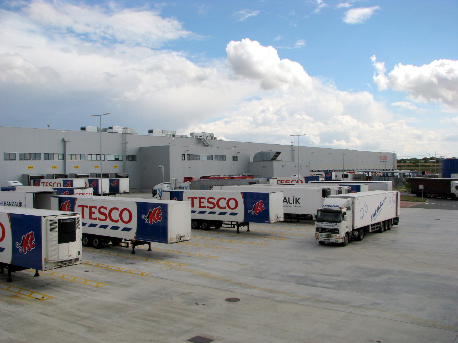 Distribuční centrum Tesco Postřižín